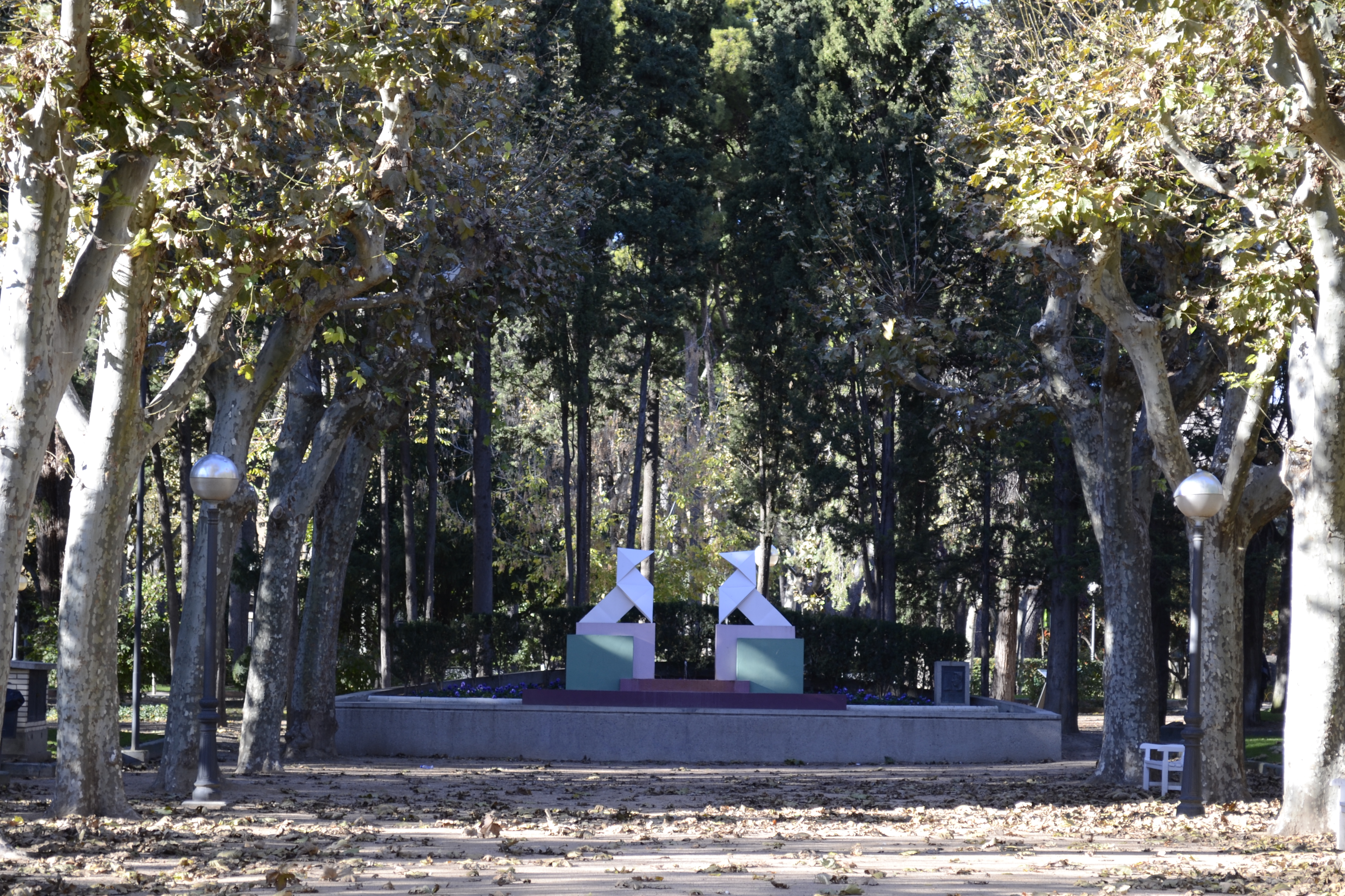 Pajaritas de Huesca, diseño de Ramón Acín.